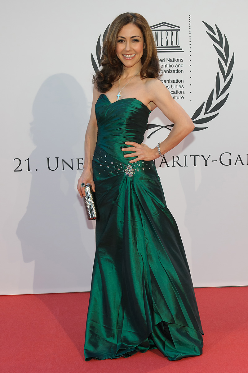 Anastasia Zampounidis auf der 21. UNESCO Charity Gala am 27. Oktober 2012 in Düsseldorf.